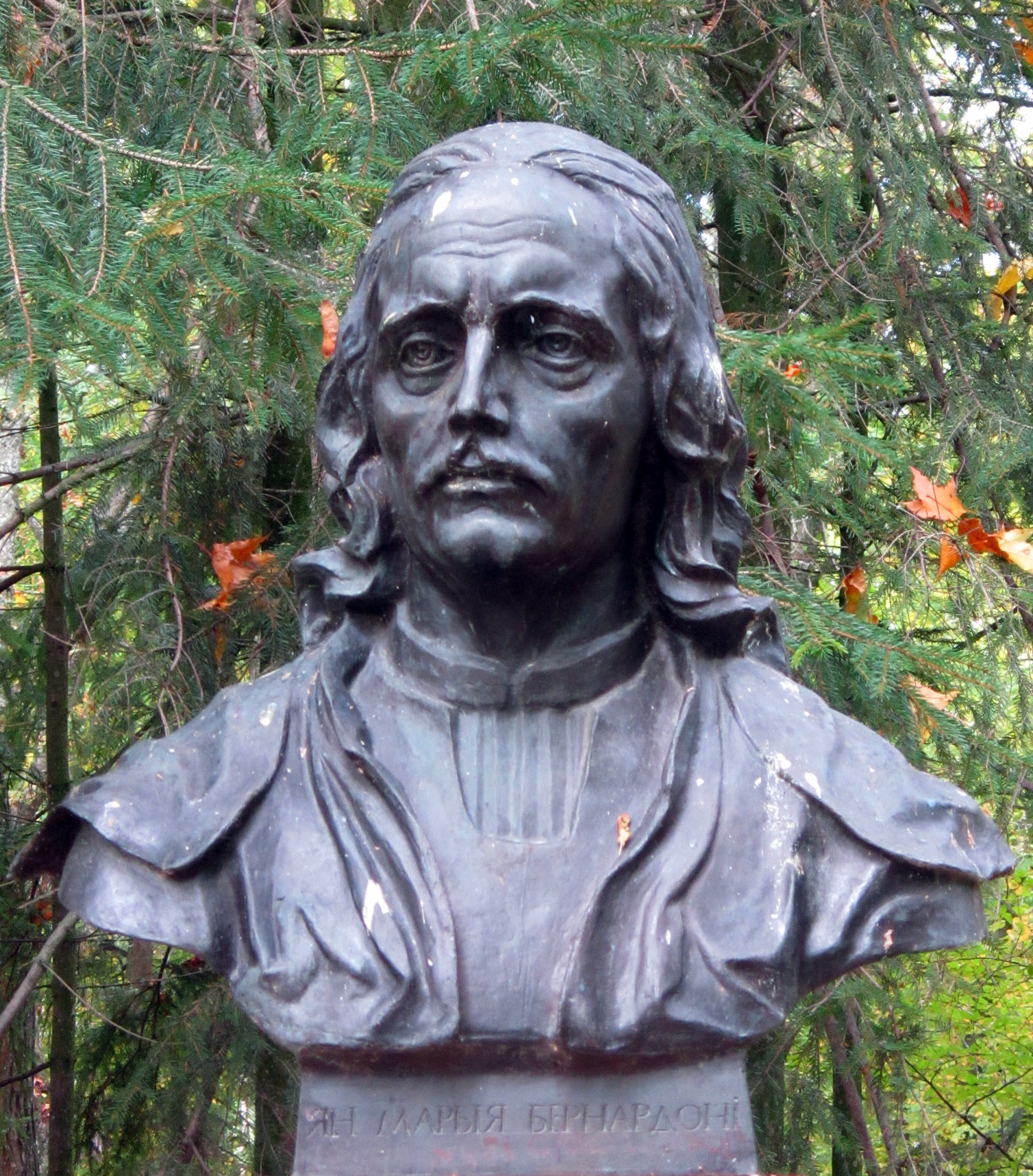 Бюст Джованни Мария Бернардони в Старом парке Несвижа.